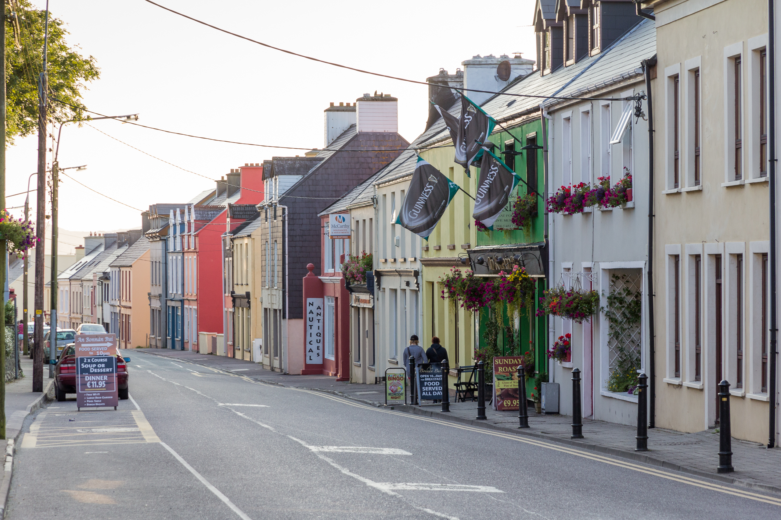 West Main Street in Caherciveen, Co. Kerry